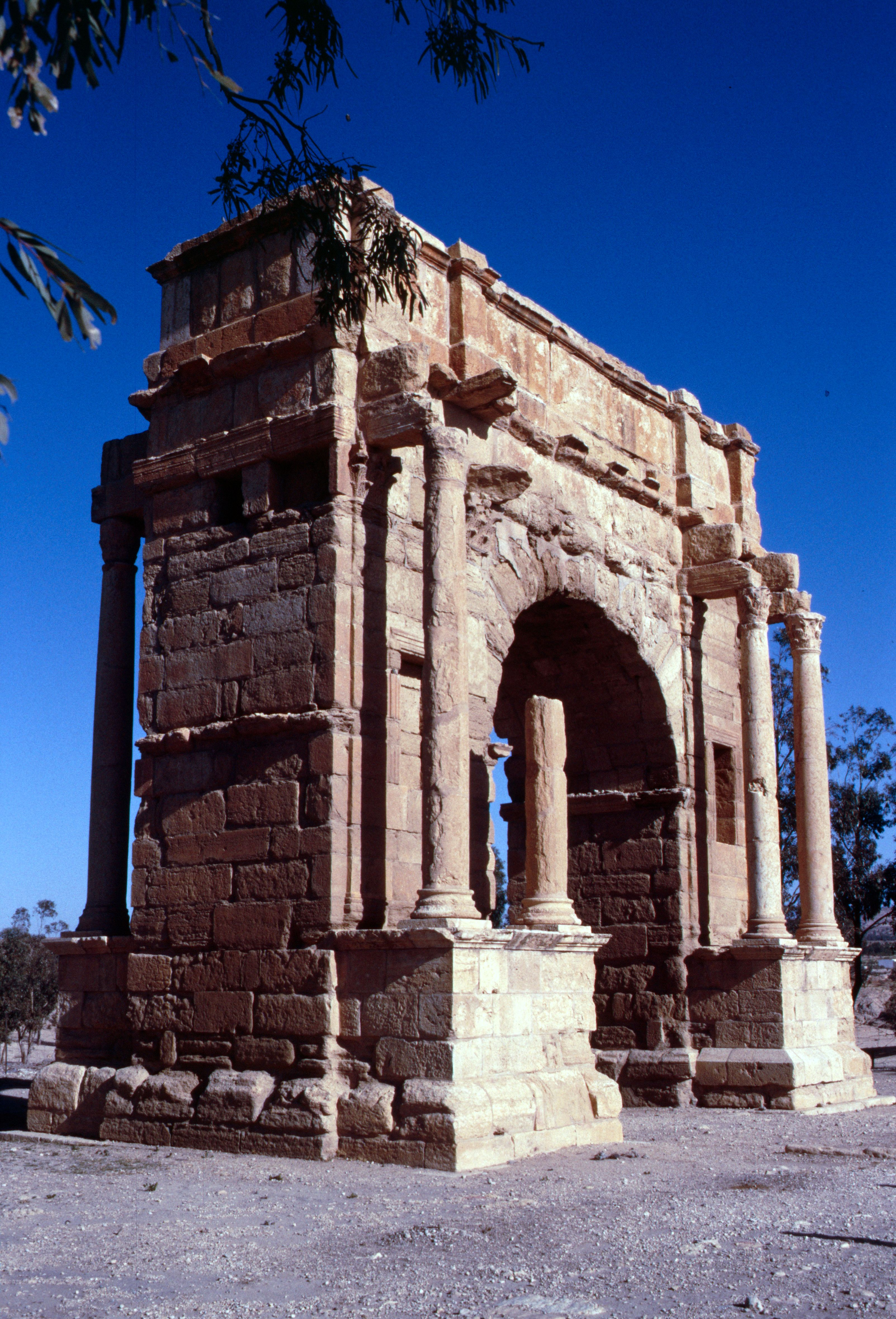 Triumphbogen des Diokletian 1988